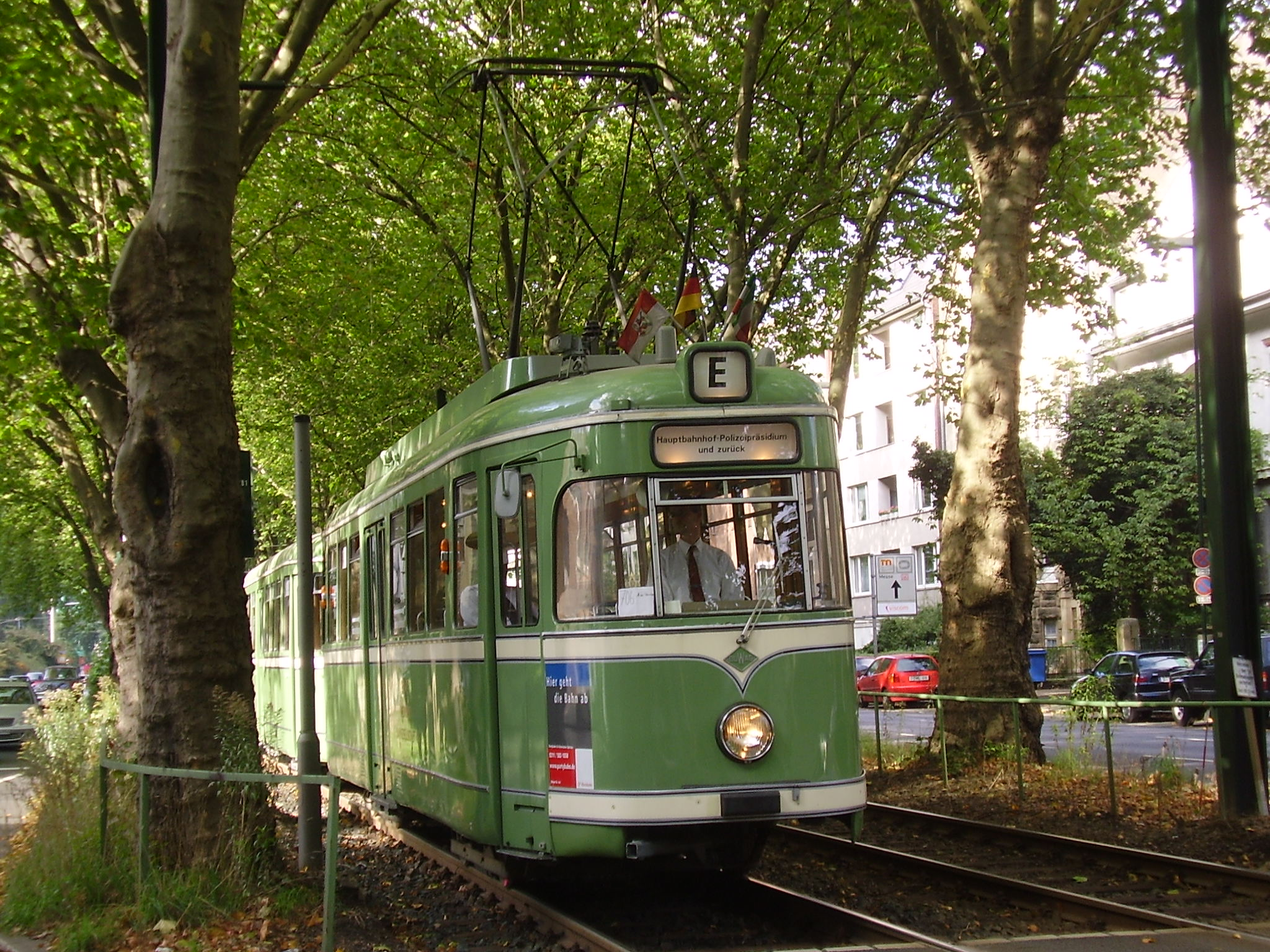 Wagen 2014 an der Lindemannstraße nahe der Haltestelle Schumannstraße.